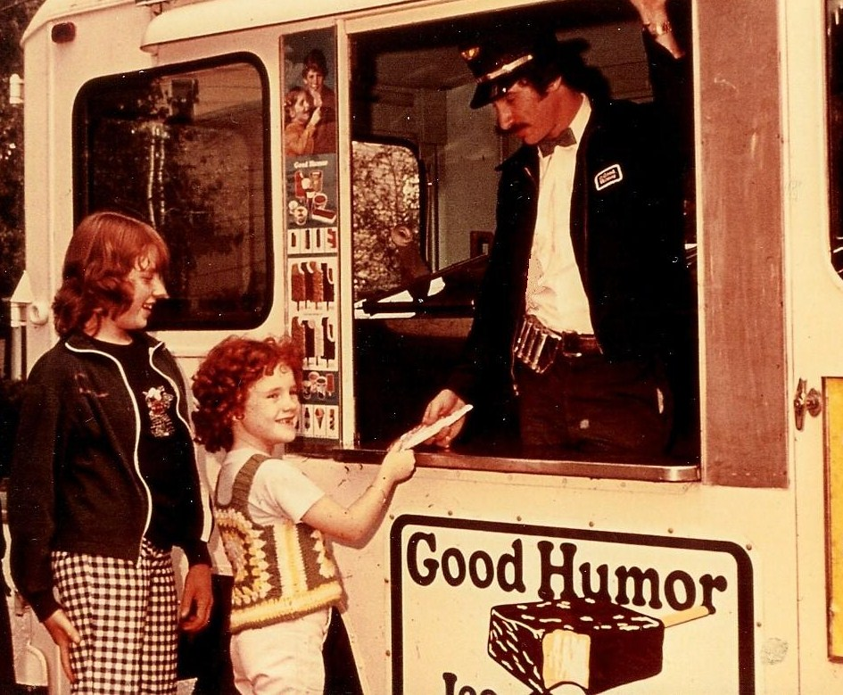 A Good Humor vendor